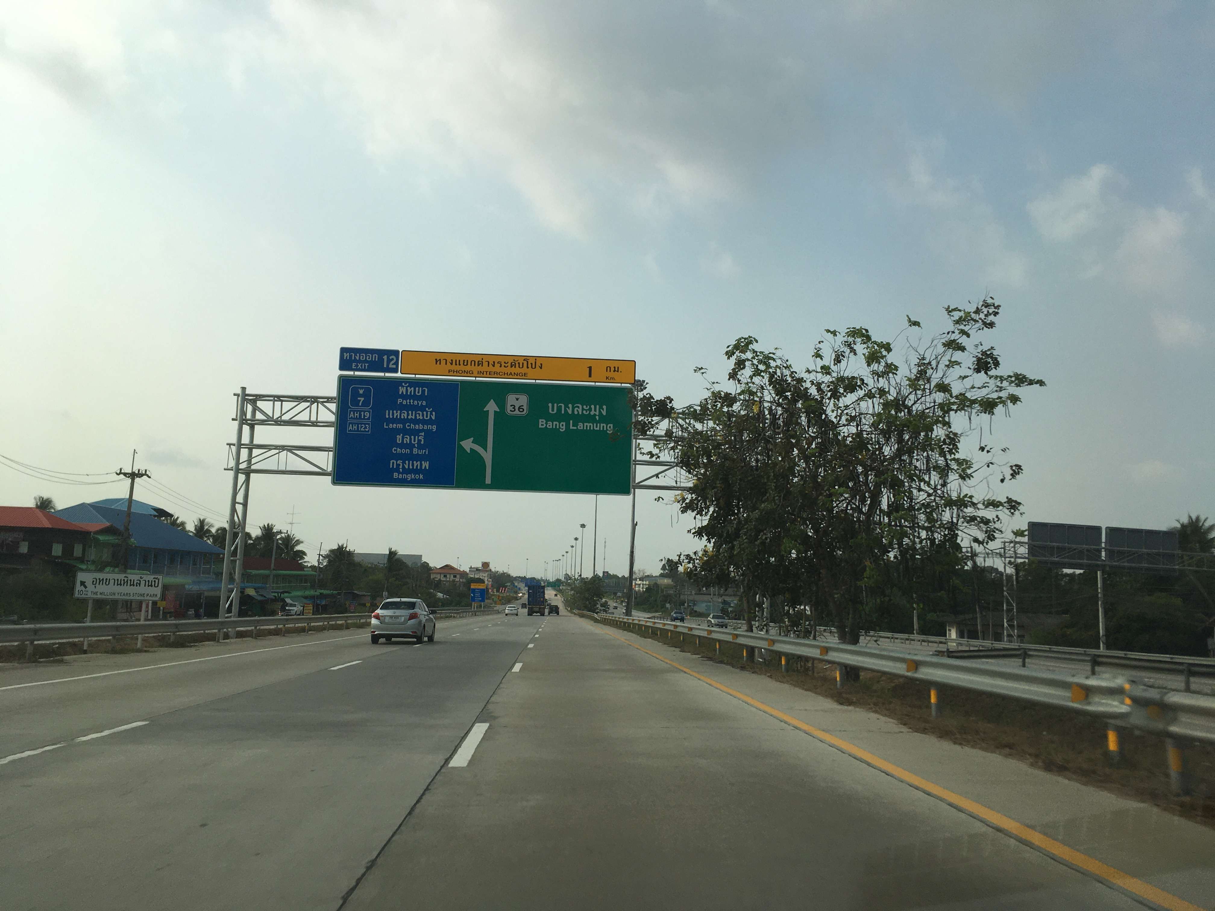 ทล.36 ทางแยกต่างระดับโป่ง ขาเข้าพัทยา